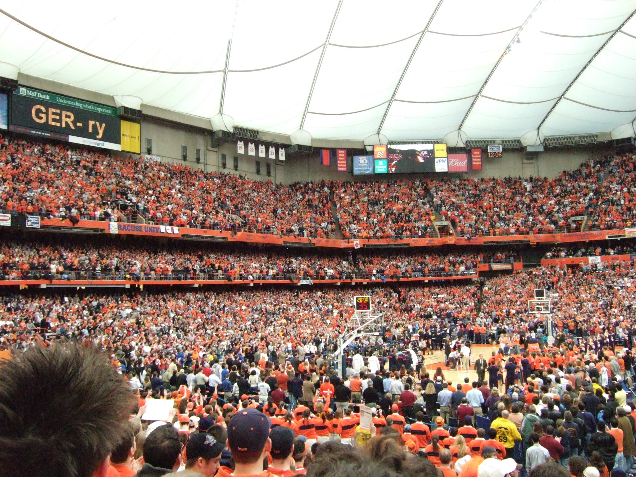 03/05/06 taken by Kisstory